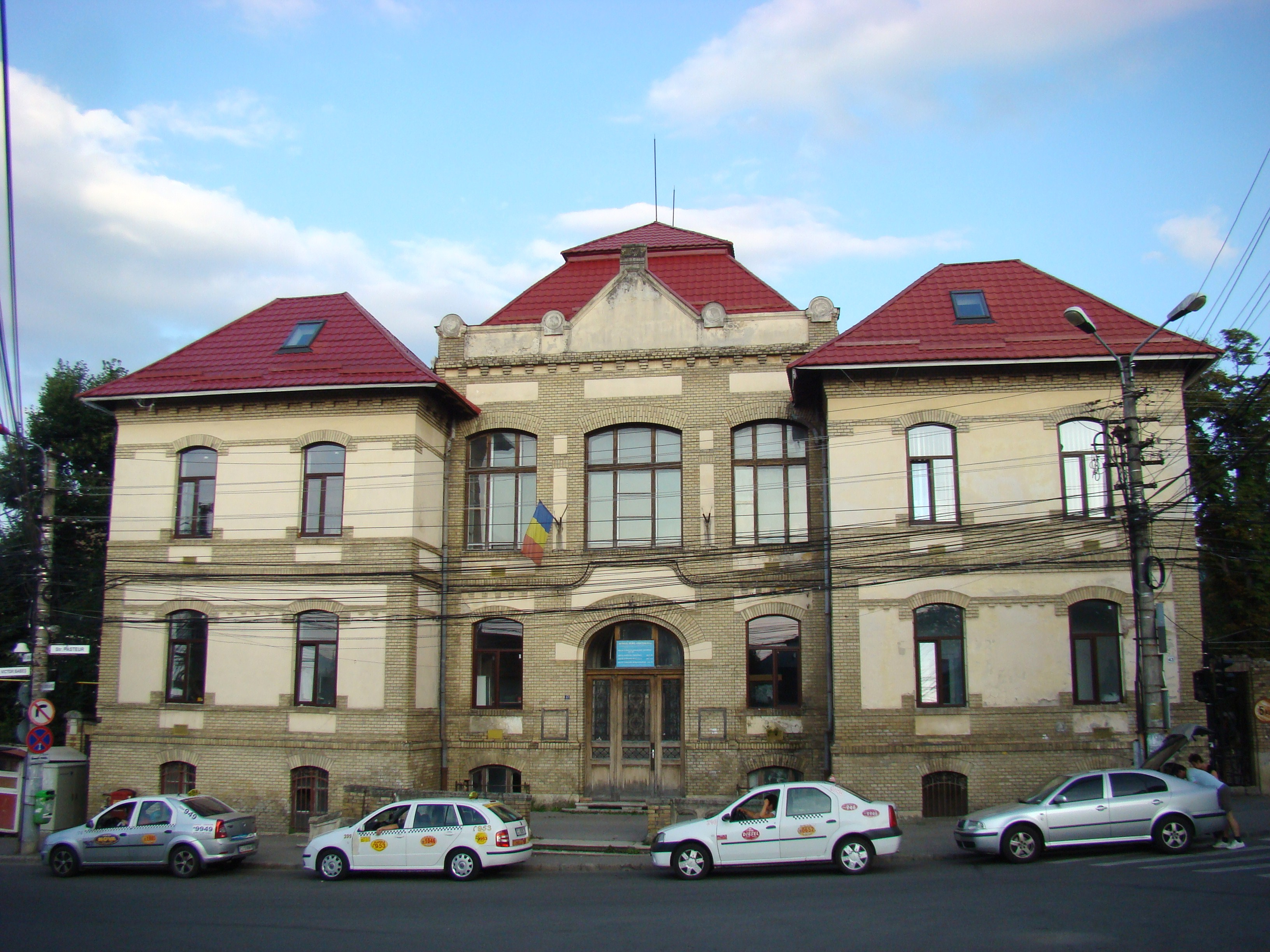 Clădire monument istoric, str.Victor Babeș, nr.43